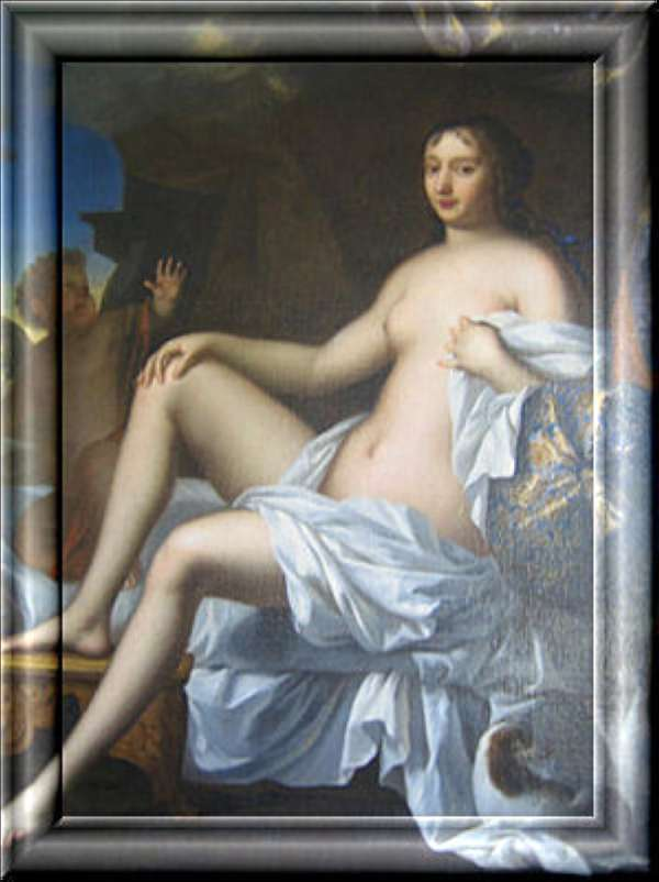 François d'Aubigné en Nymphe